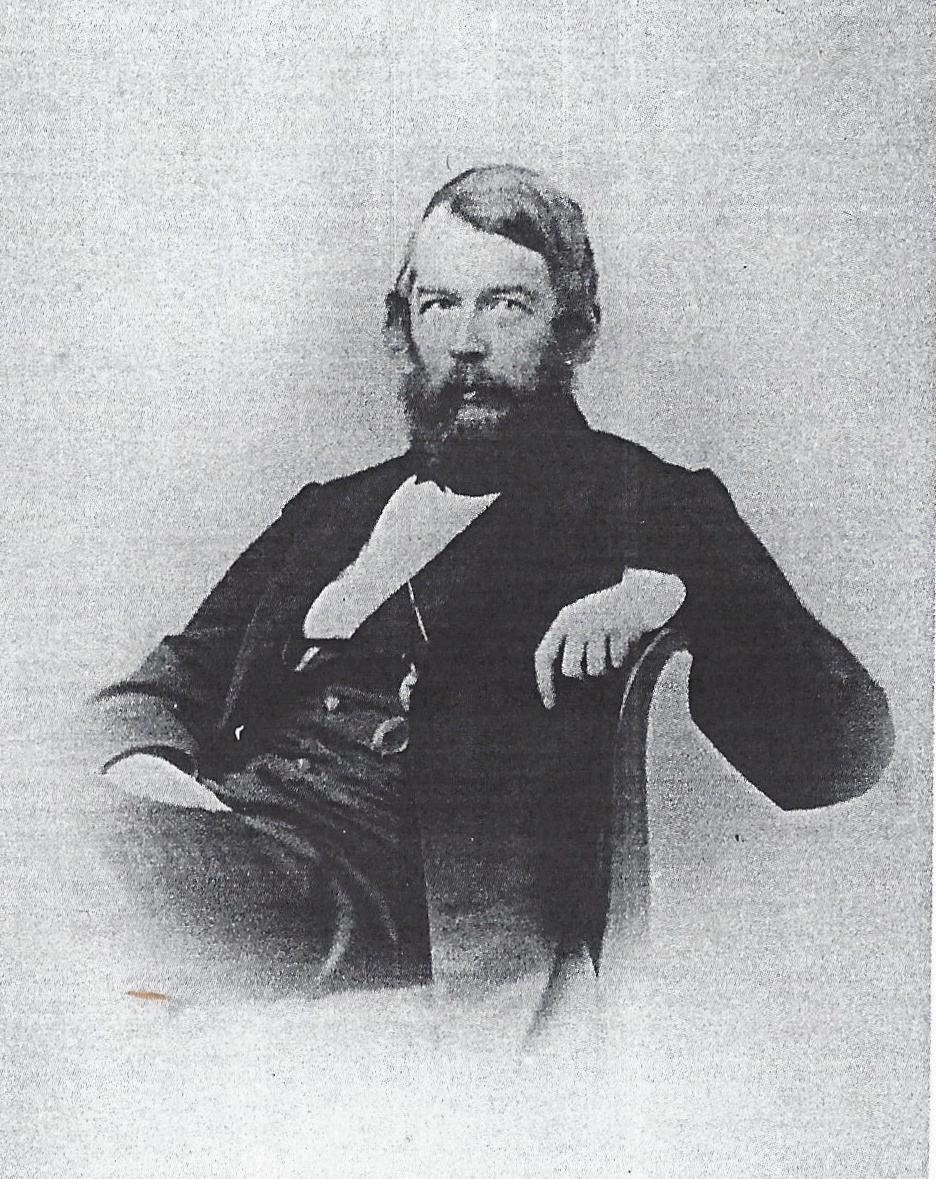 Fotografie von Hermann Schläger (1820-1889)